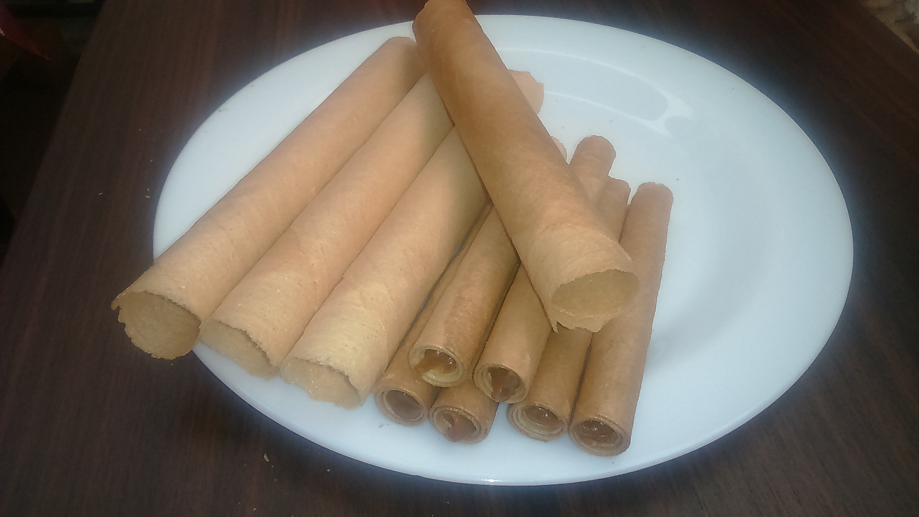 cuchuflis rellenos con manjar, a un costado Barquillos artesanales.